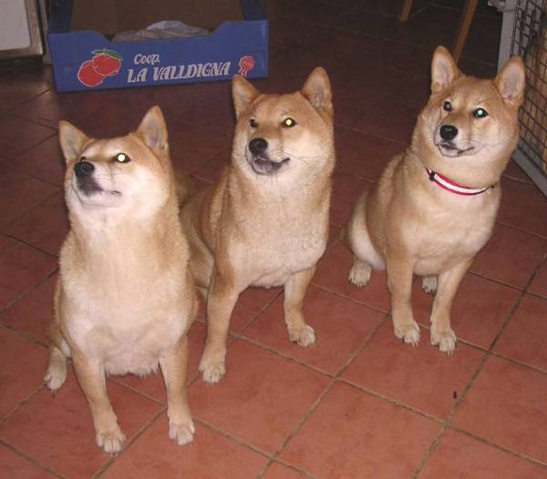 Feny plemene shiba - matka + dvě dcery po dvou různých otcích (Bakuchi Doubravecký vrch - 8 let, Joyú Nishiki z Helfštýnského panství - 2 roky, Musume Ginsei z H.p. - 6 měsíců)